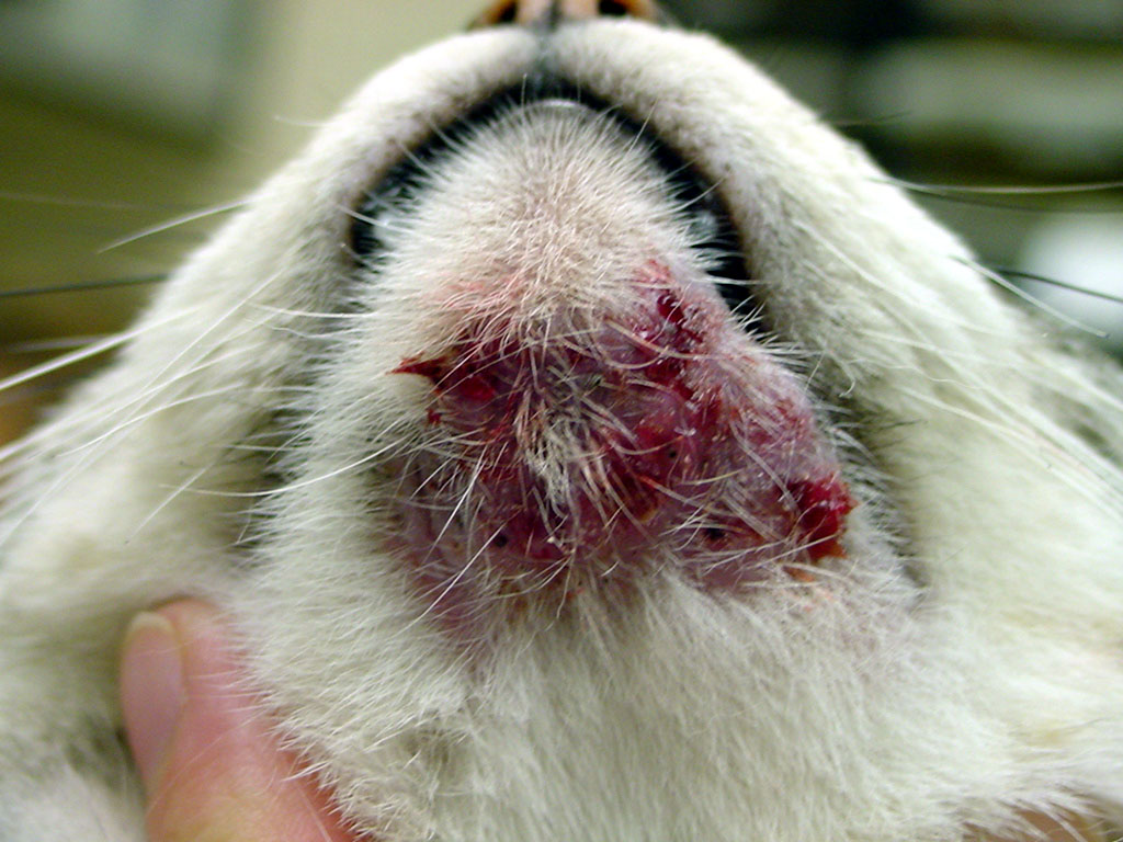 pustular feline chin acne